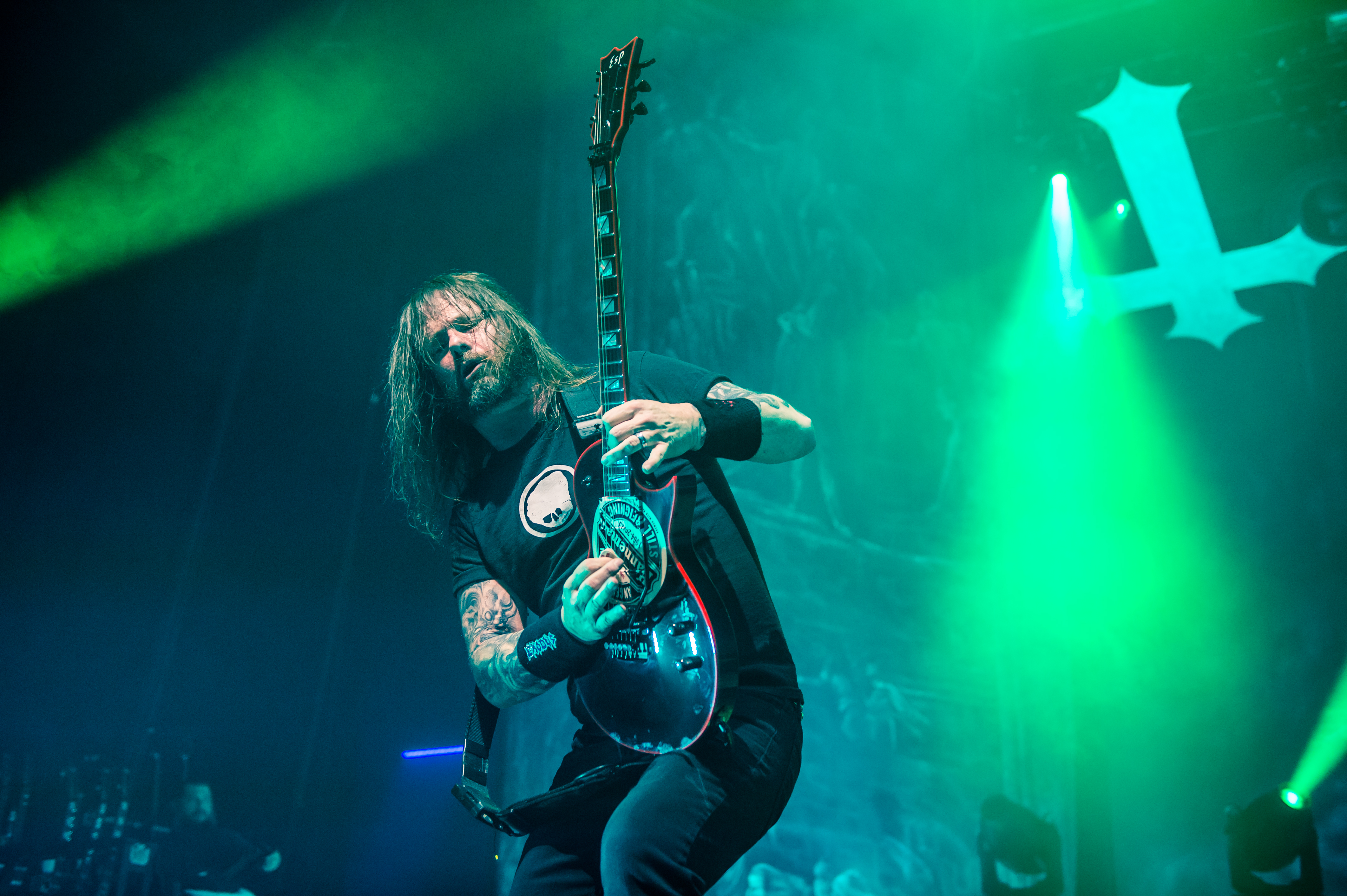 'Slayer Tour 2015 Bochum'